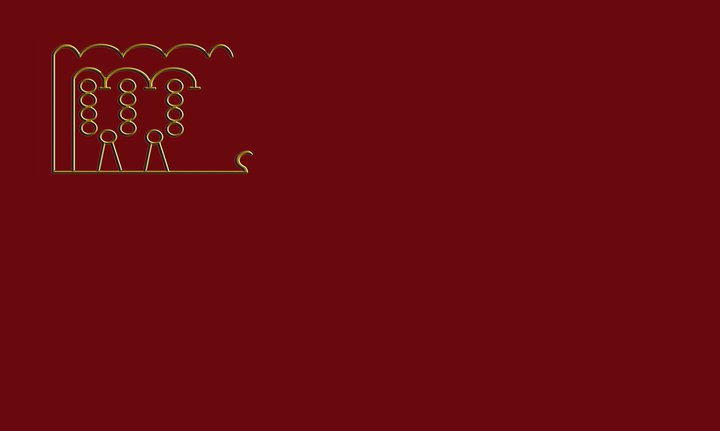 Salas de los Infantes Flag